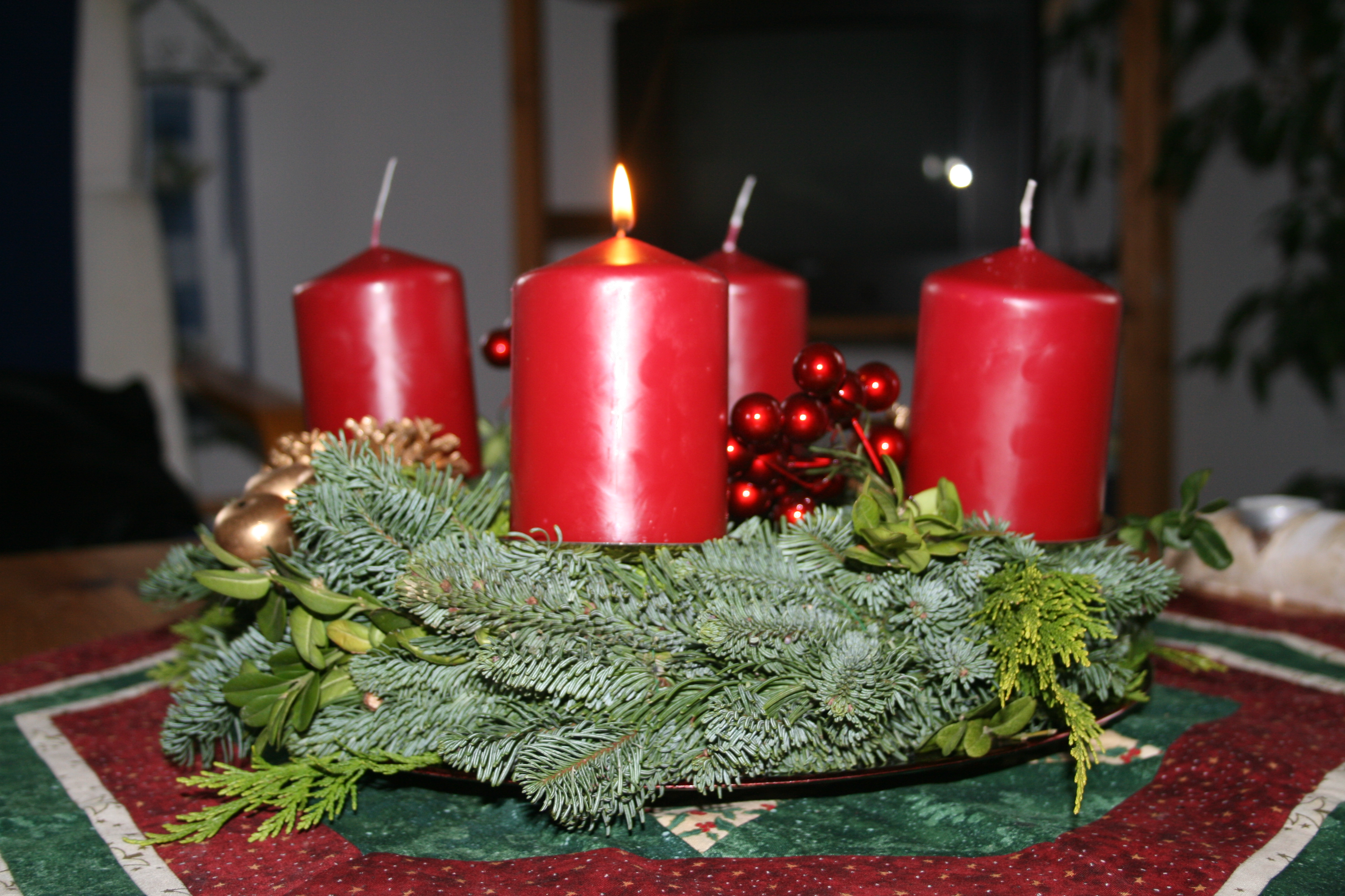 Adventskranz mit einer brennenden Kerze